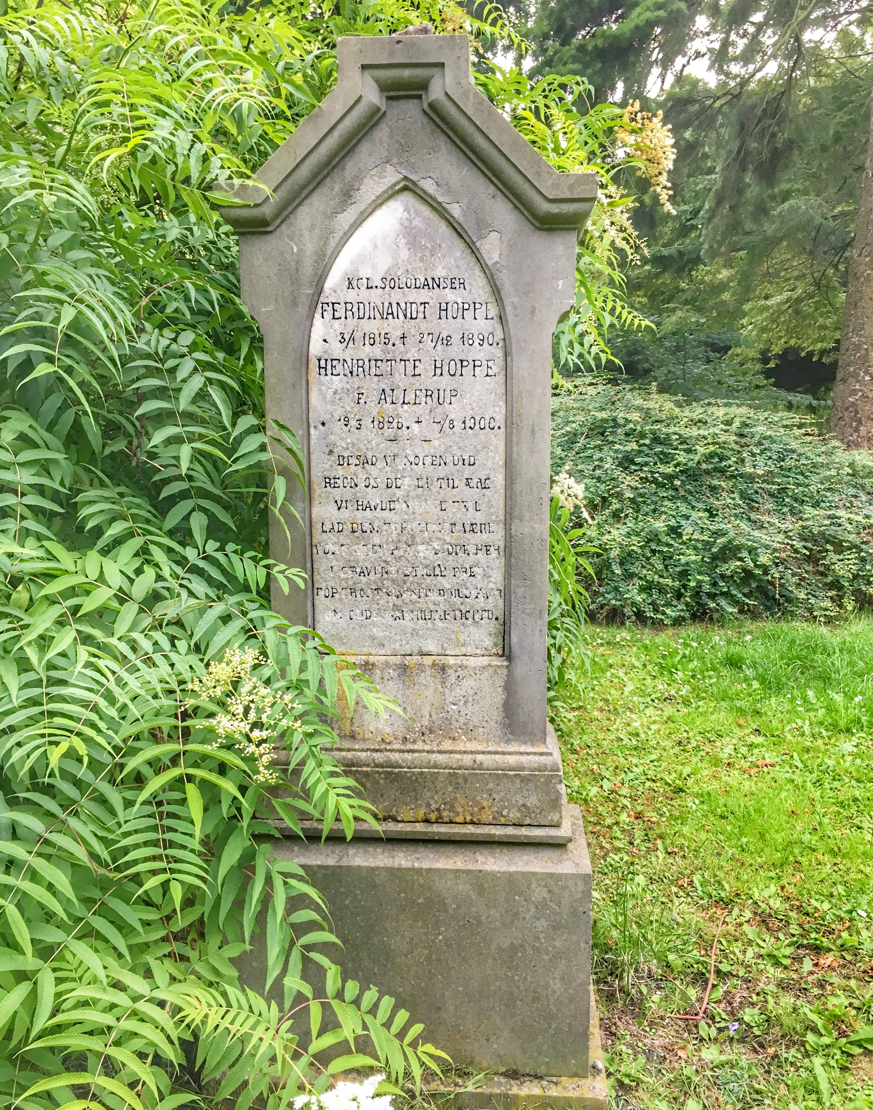 Kgl. Solodanser Ferdinandt Hoppe og hustru Henriette f. Allerups gravsten på Assistens Kirkegård, København